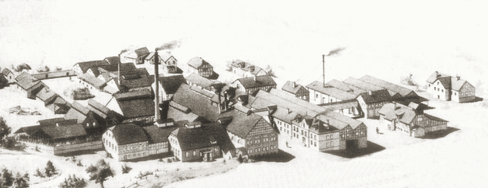 Lithographie der Glashütte Grünenplan